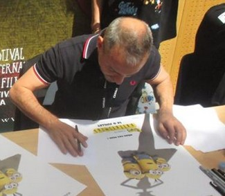 Kyle Balda au festival international du film d'Annecy